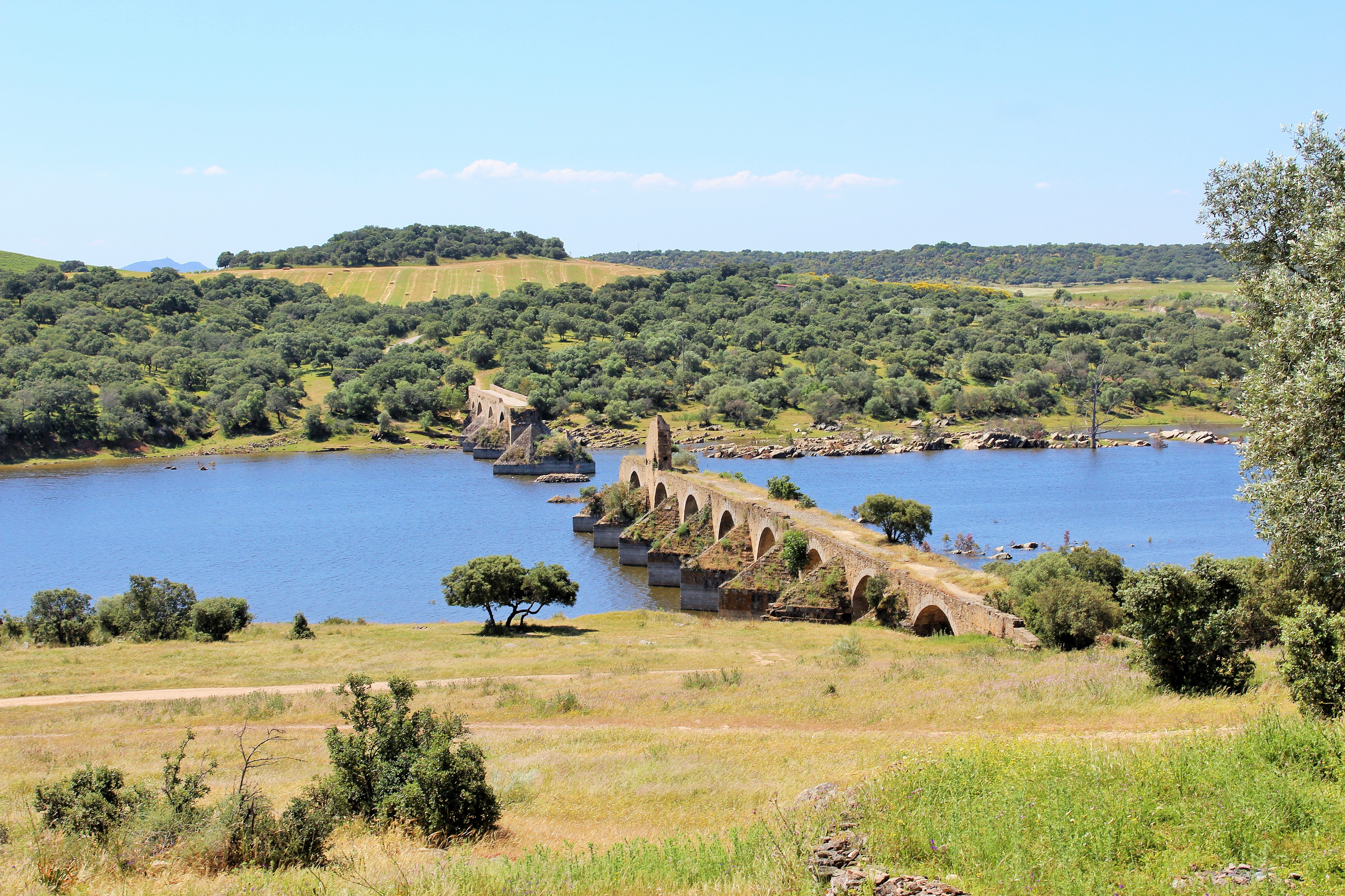 Río Guadiana Internacional al fondo. This is a photography of a Special Area of Conservation in Spain with the ID: ES4310027. Natura2000 entry, EEA entry